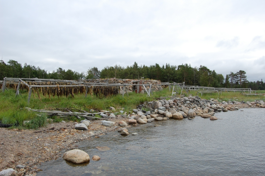 Сушка ламинарии на рыболовной тоне Новая Сосновка